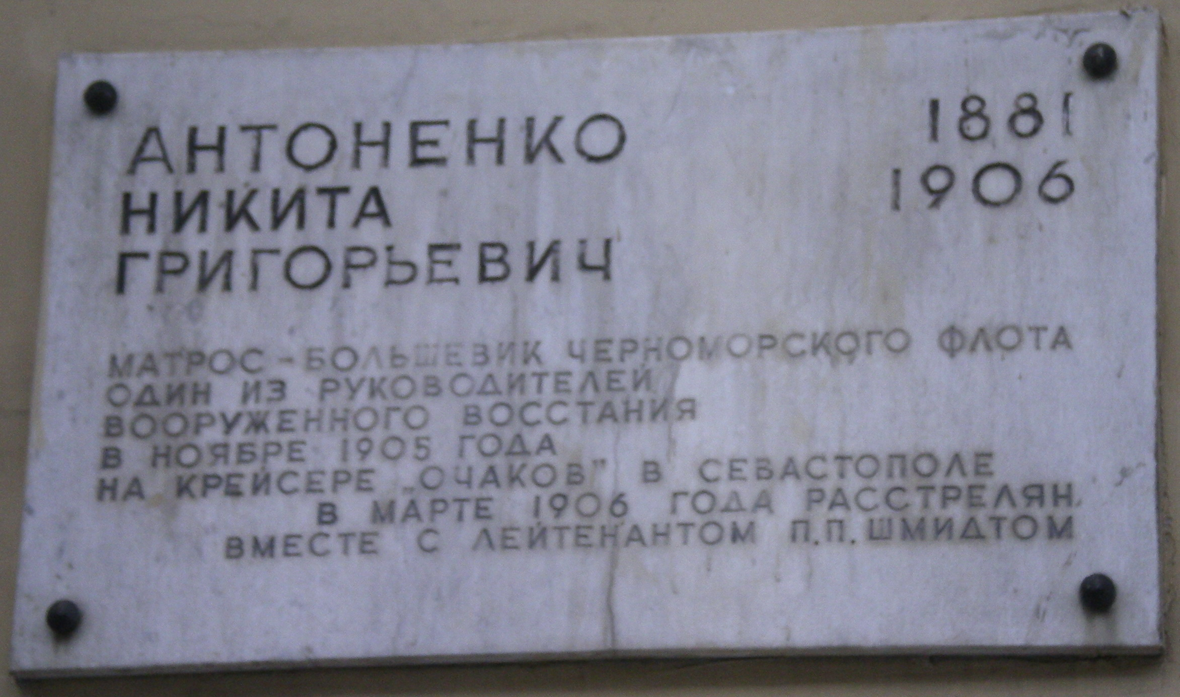 Табличка по адресу переулок Антоненко, 8